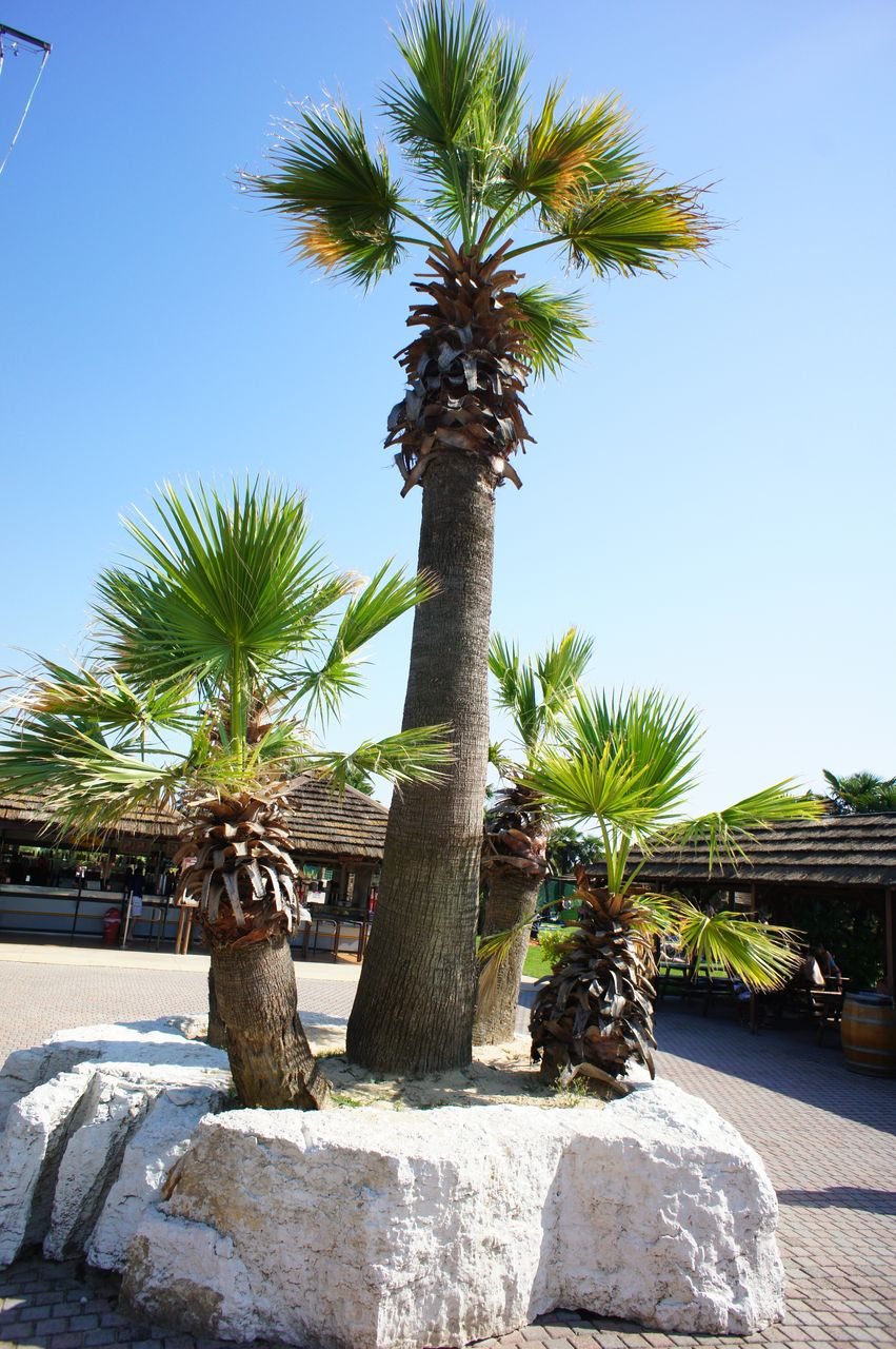 Lido de Jesolo, Aqualandia